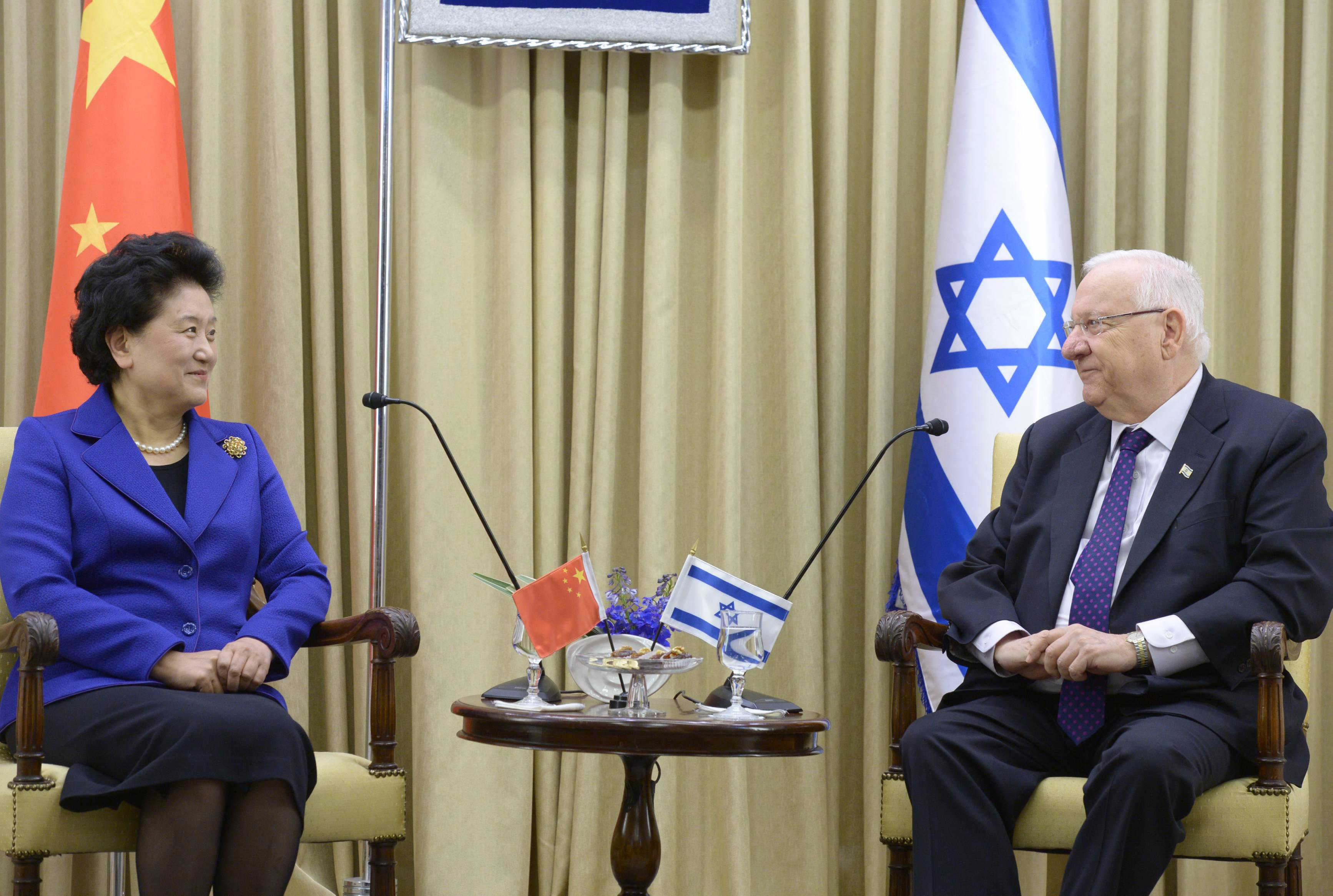 ראובן ריבלין עם סגנית ראש ממשלת סין ליו לנדונג בביקור בישראל